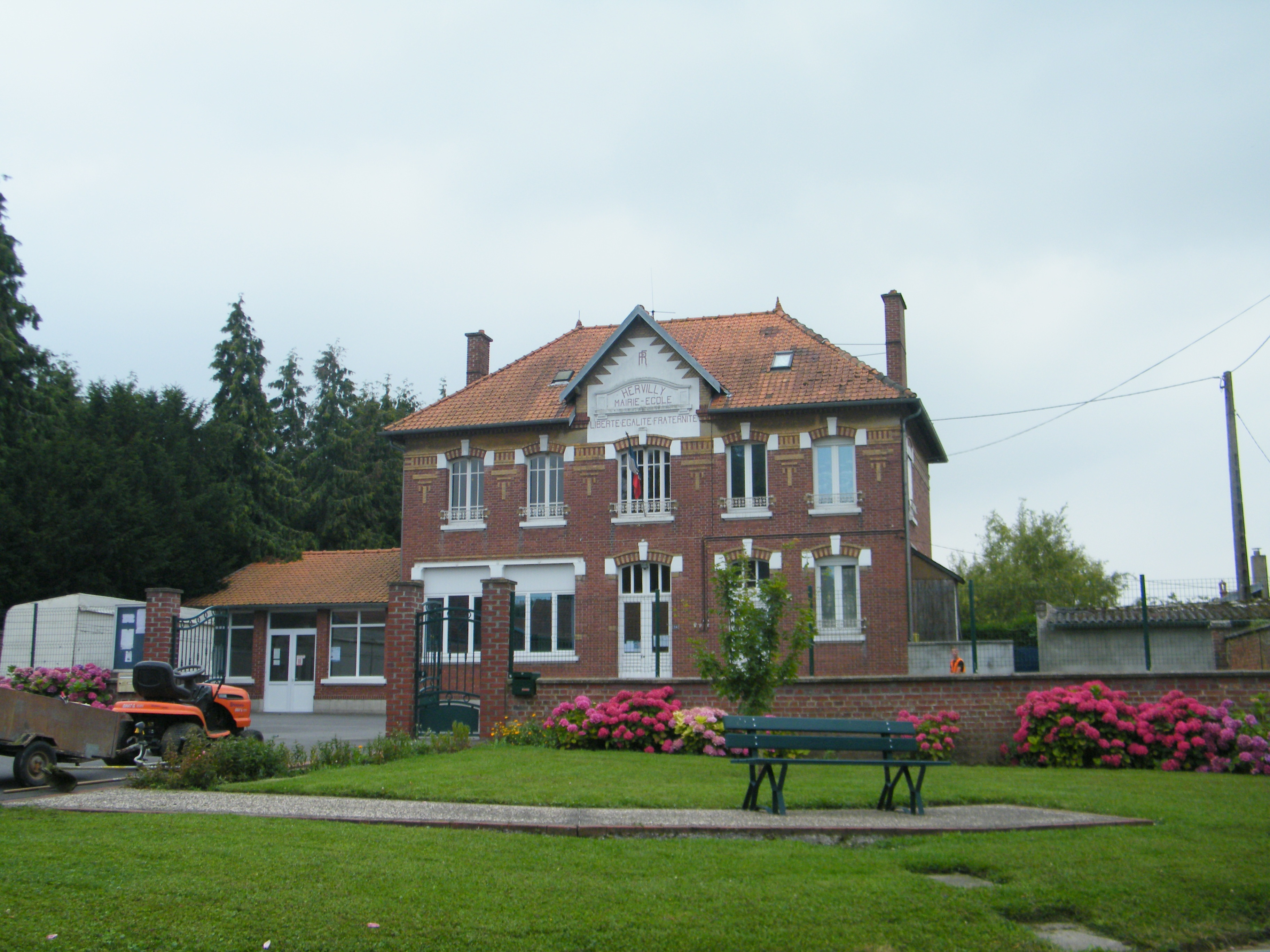 Mairie.